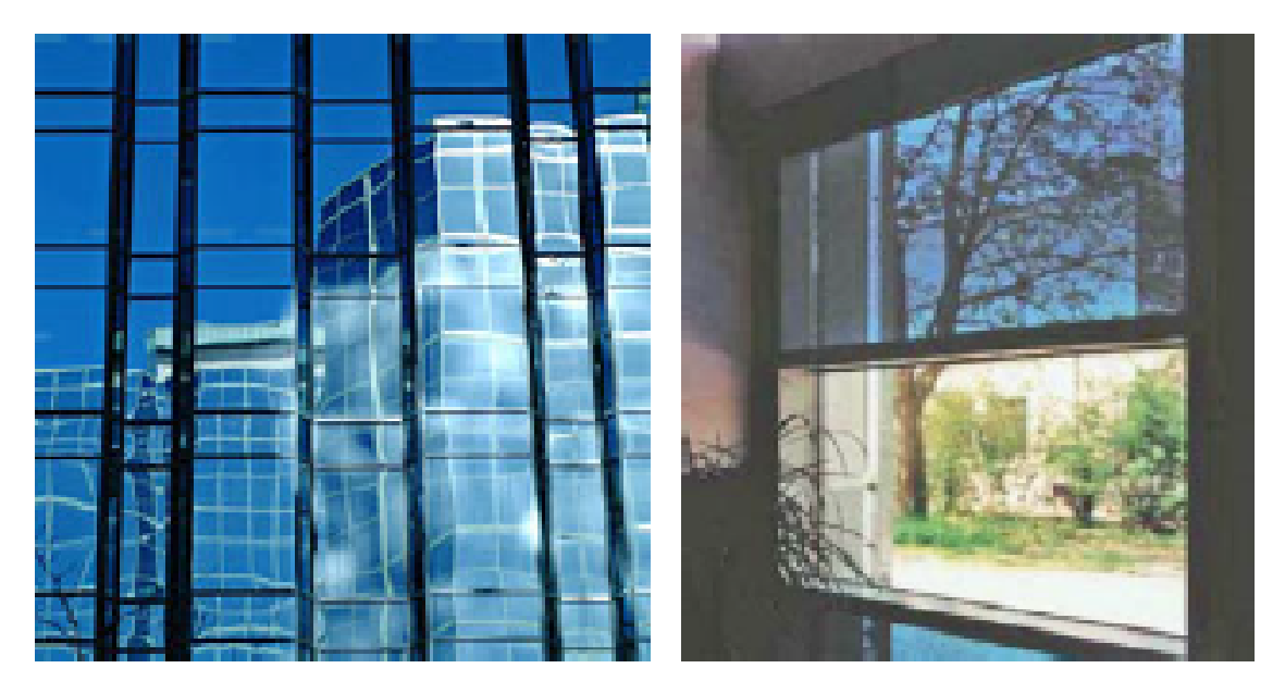 Nanotechnology in the construction - Glass electrochromic coating